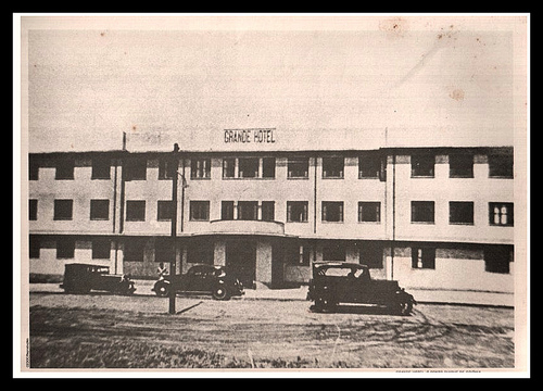 Grande Hotel